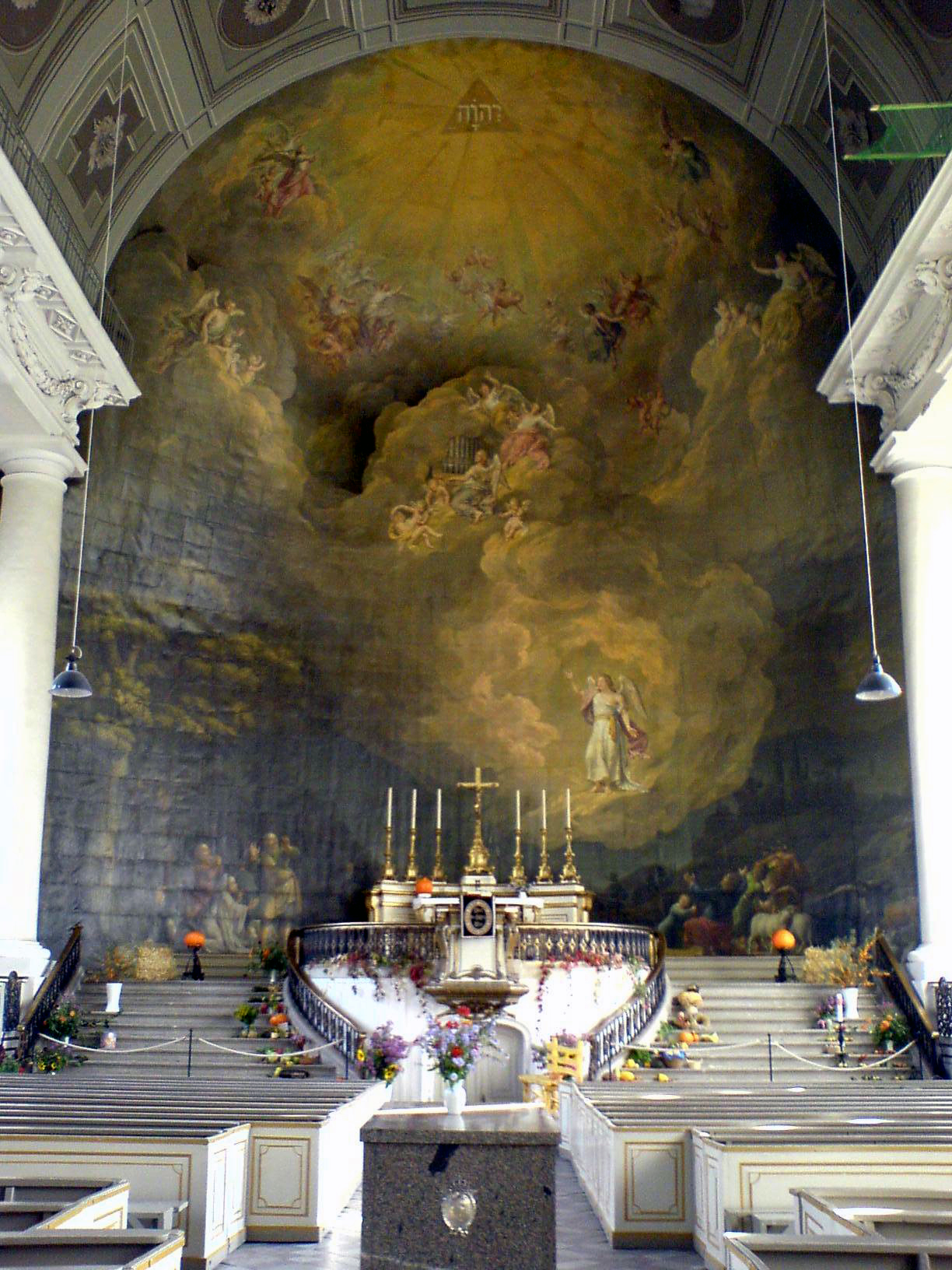 Schloss Ludwigslust, Kirche, Altar